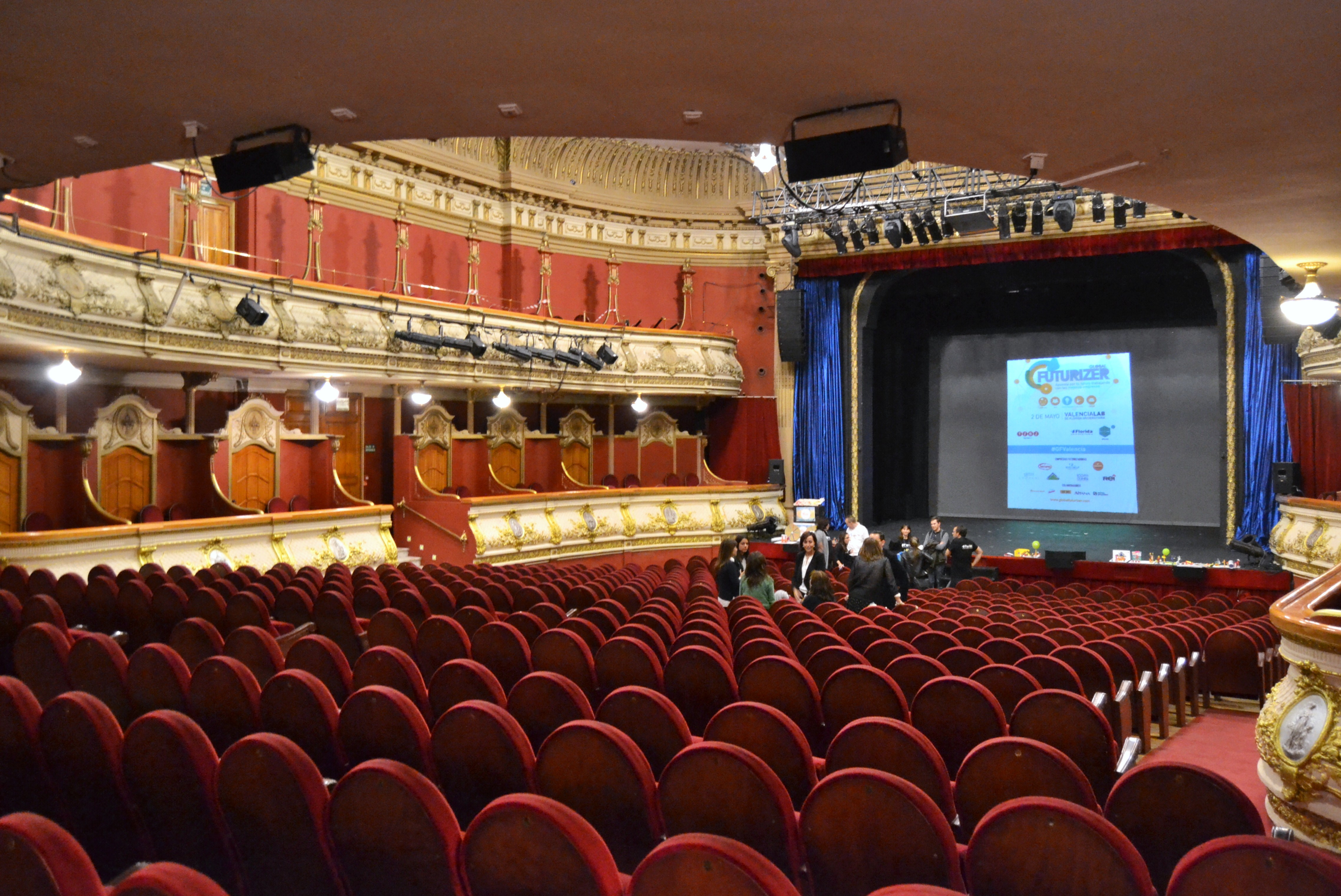 Teatre Olympia de València, interior.